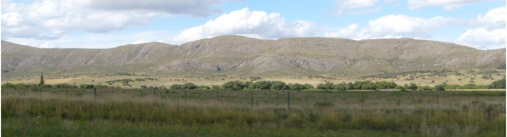 Panorámica del sistema de Pillahuincó . Sistema de Ventania . Buenos Aires